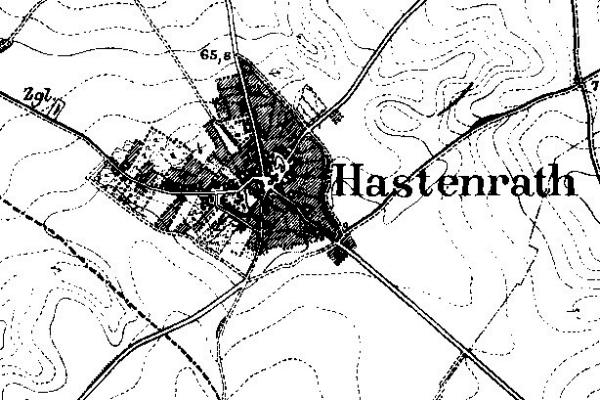 Neuaufnahme 1891-1912